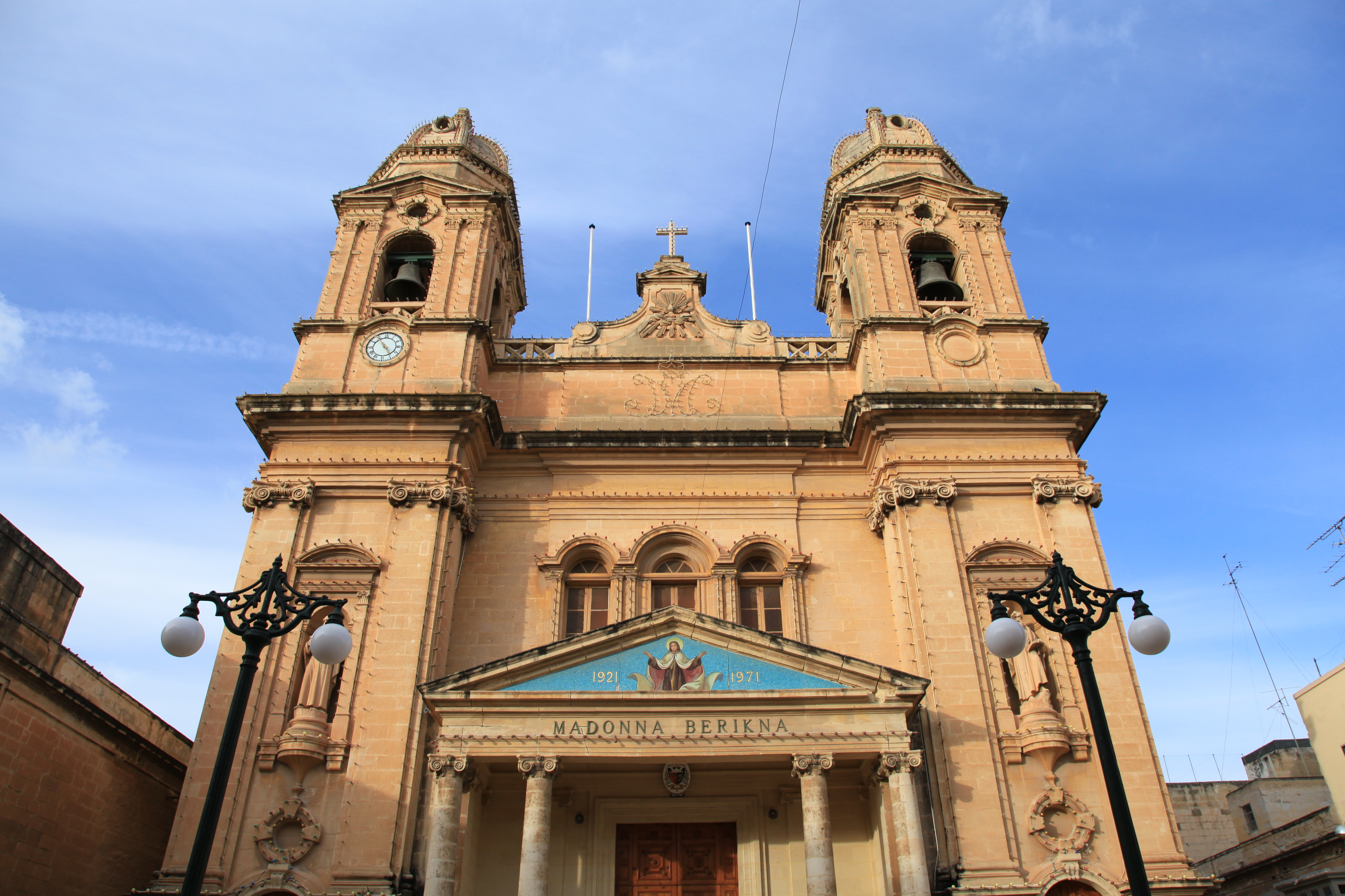 Our Lady of Mount Carmel Church, Triq Manoel De Vilhena in Gżira, Malta